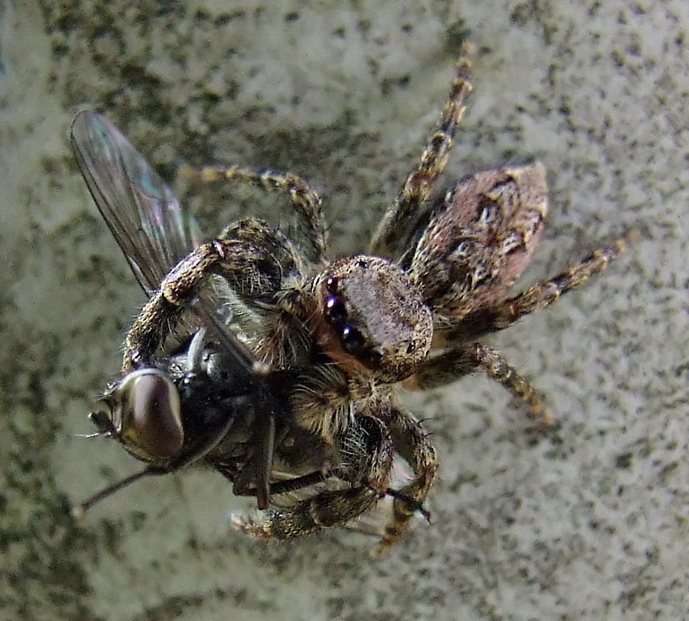 Weibchen der Rindenspringspinne (Springspinne Marpissa Muscosa) mit Beute, aufgenommen bei Mintard (bei Krefeld) im August 2007